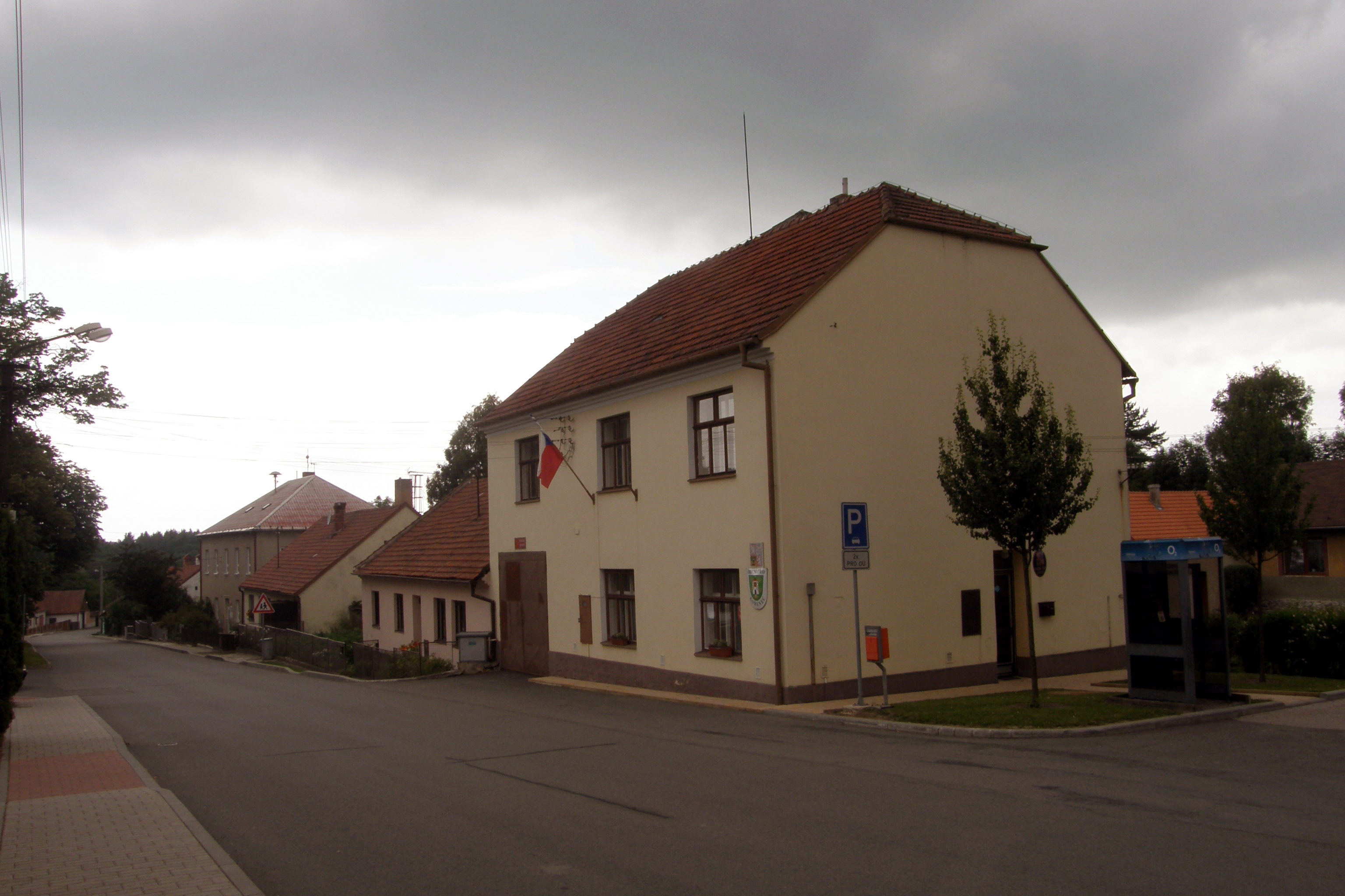 Obecní úřad v Kořenci